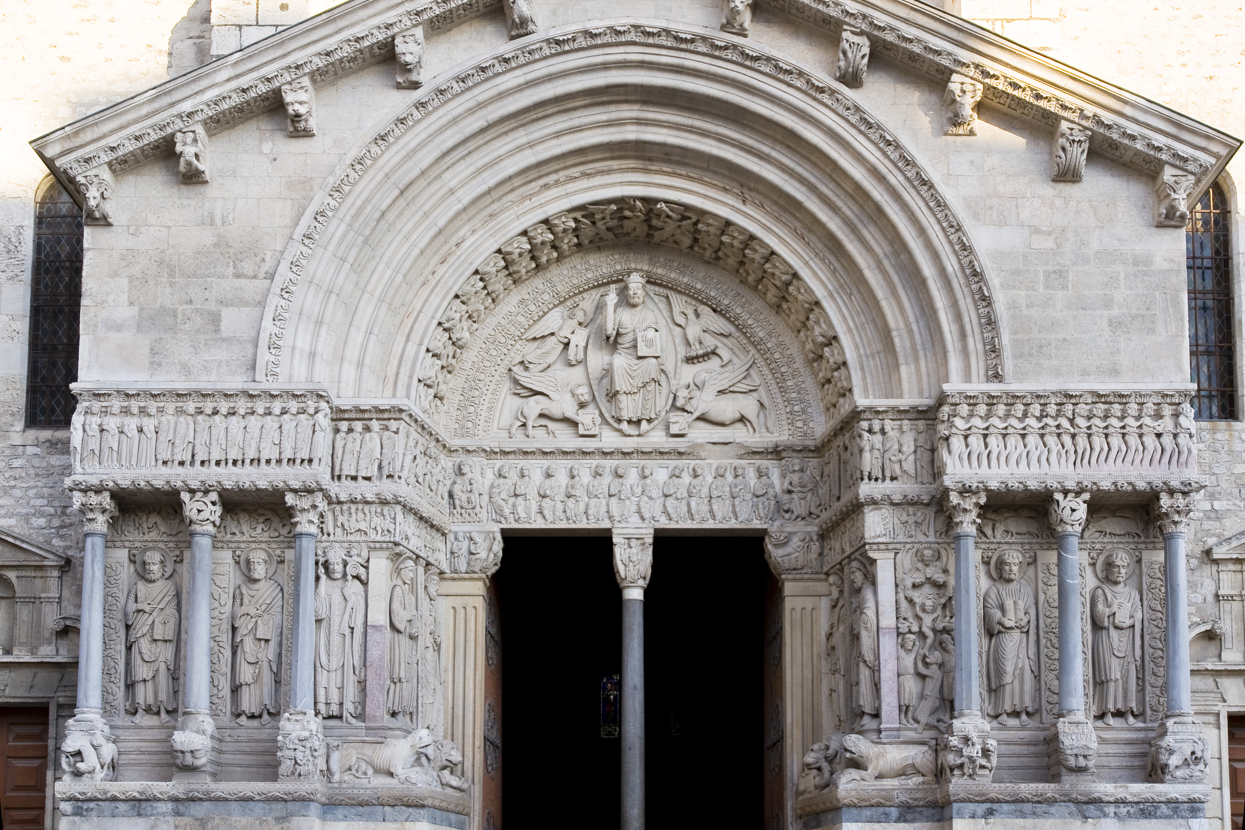 Arles, St. Trophime, Portail